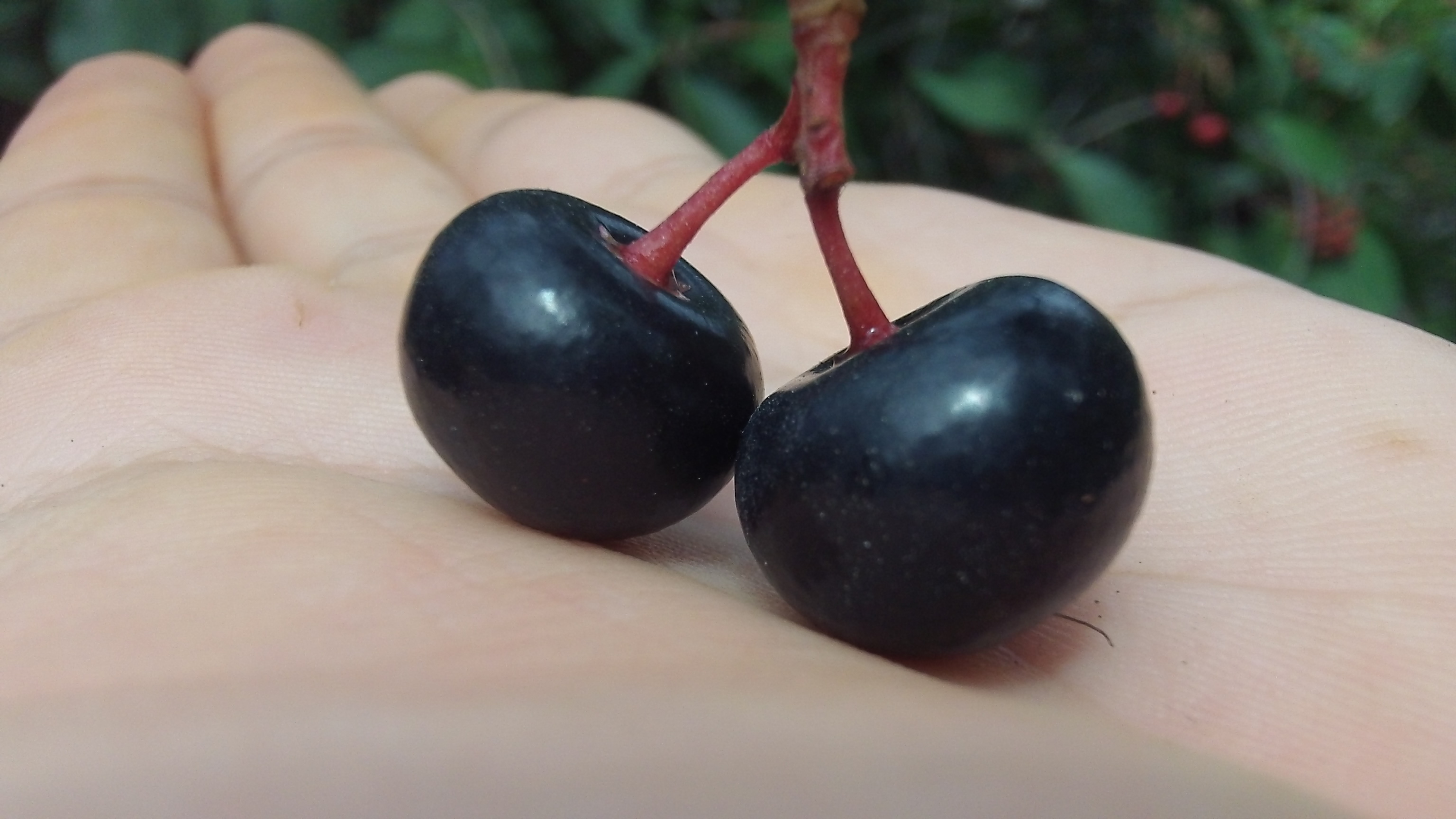 Prunus salicifolia comúnmente conocido como "capulin".